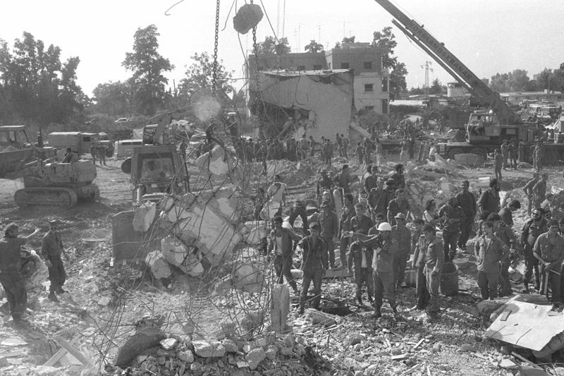 אסון צור השני, פיגוע בבית הממשל והשב"כ בצור- פינוי נפגעים והריסות.